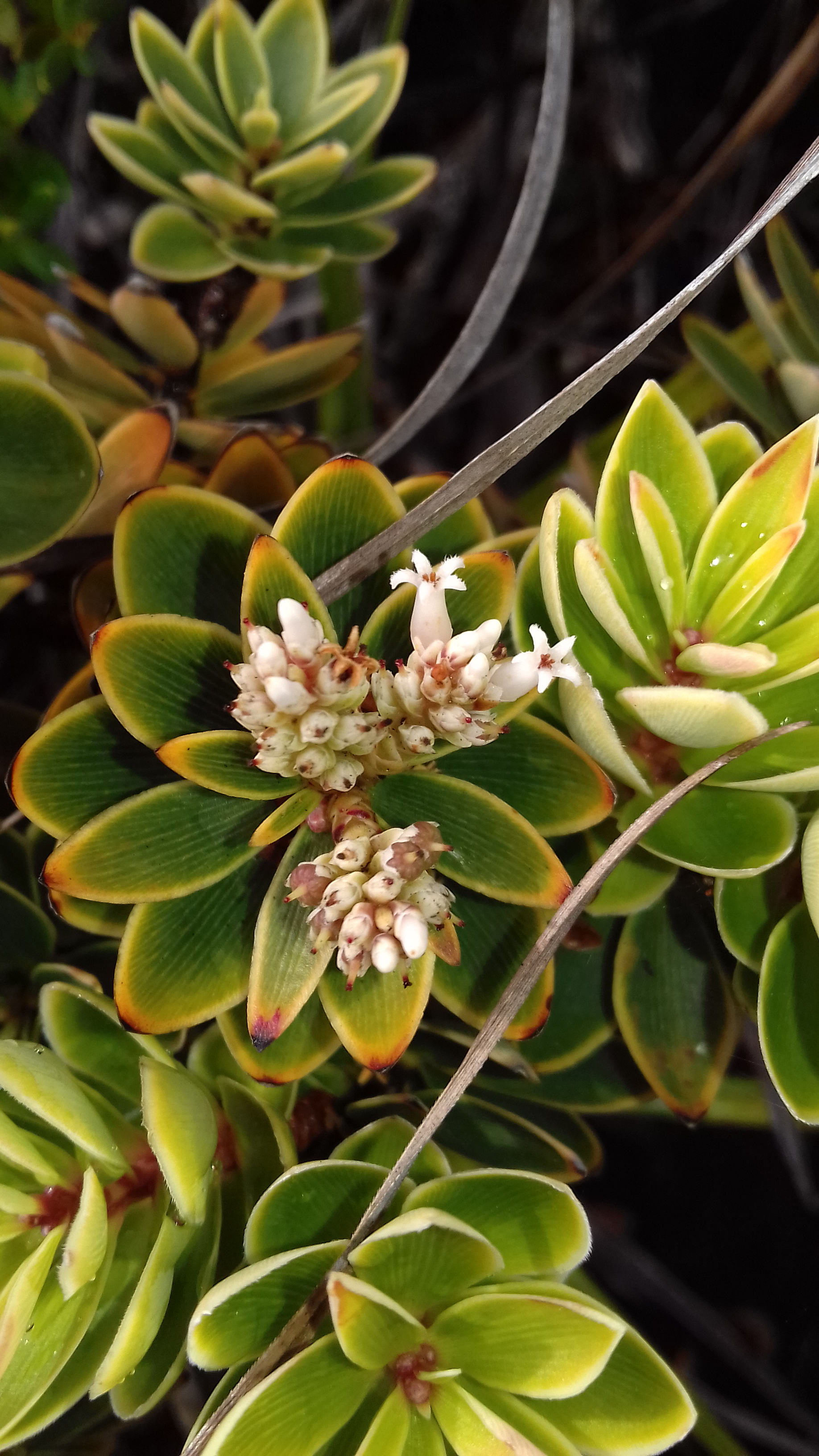 Cyathopsis albicans en fleurs (Pic aux Chèvres, Mont Dore, Province Sud, Nouvelle-Calédonie)